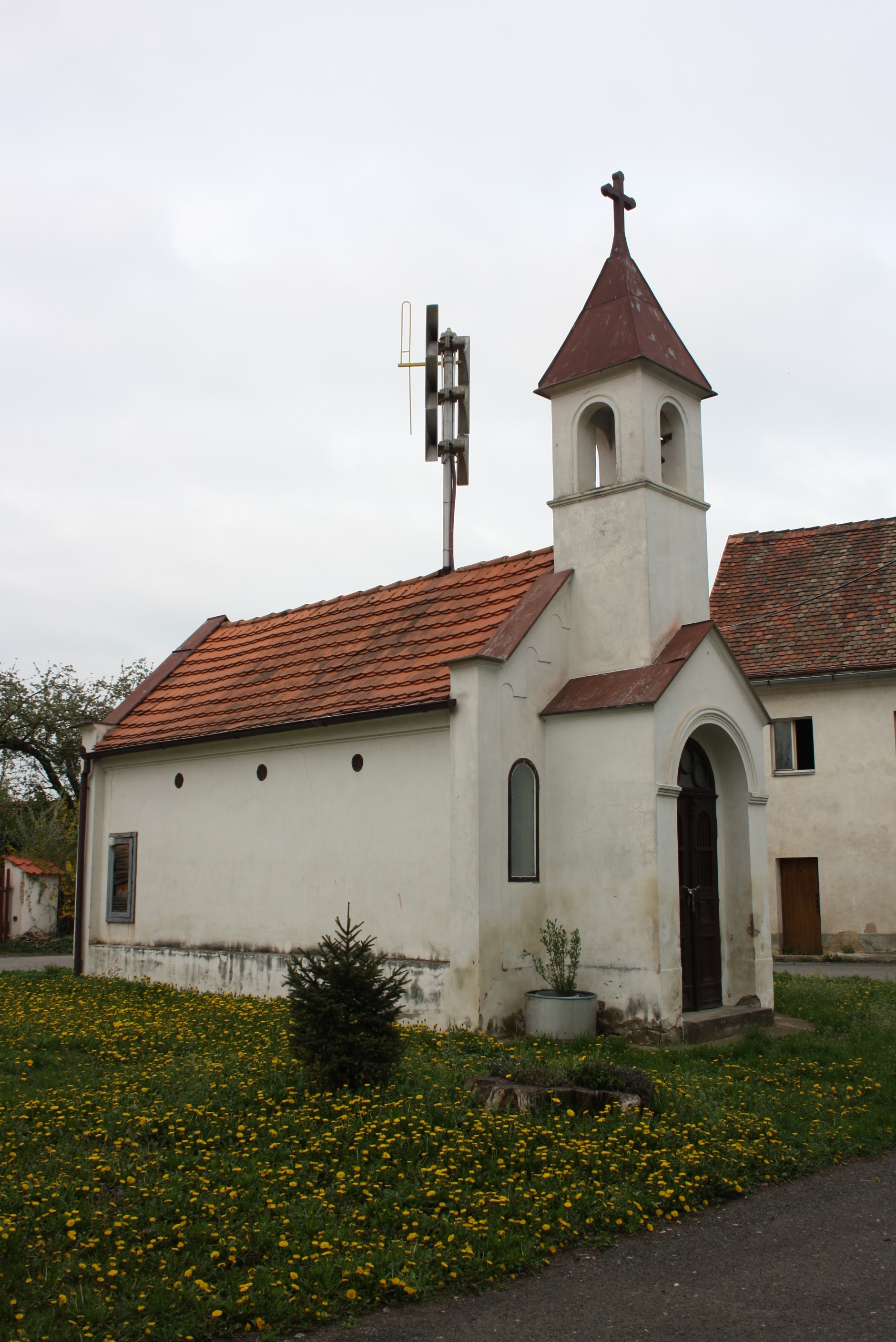 Kaplička v Oknech, součásti Polep.